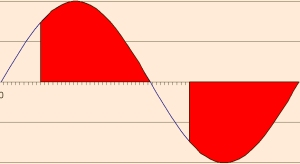 Door de auteur zelf vervaardigde afbeelding.